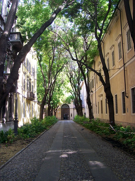 Parma - Viale che conduce alla Camera della Badessa